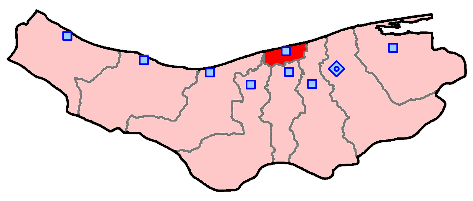 حوزهٔ انتخاباتی بابلسر و فریدونکنار برای انتخابات مجلس شورای اسلامی